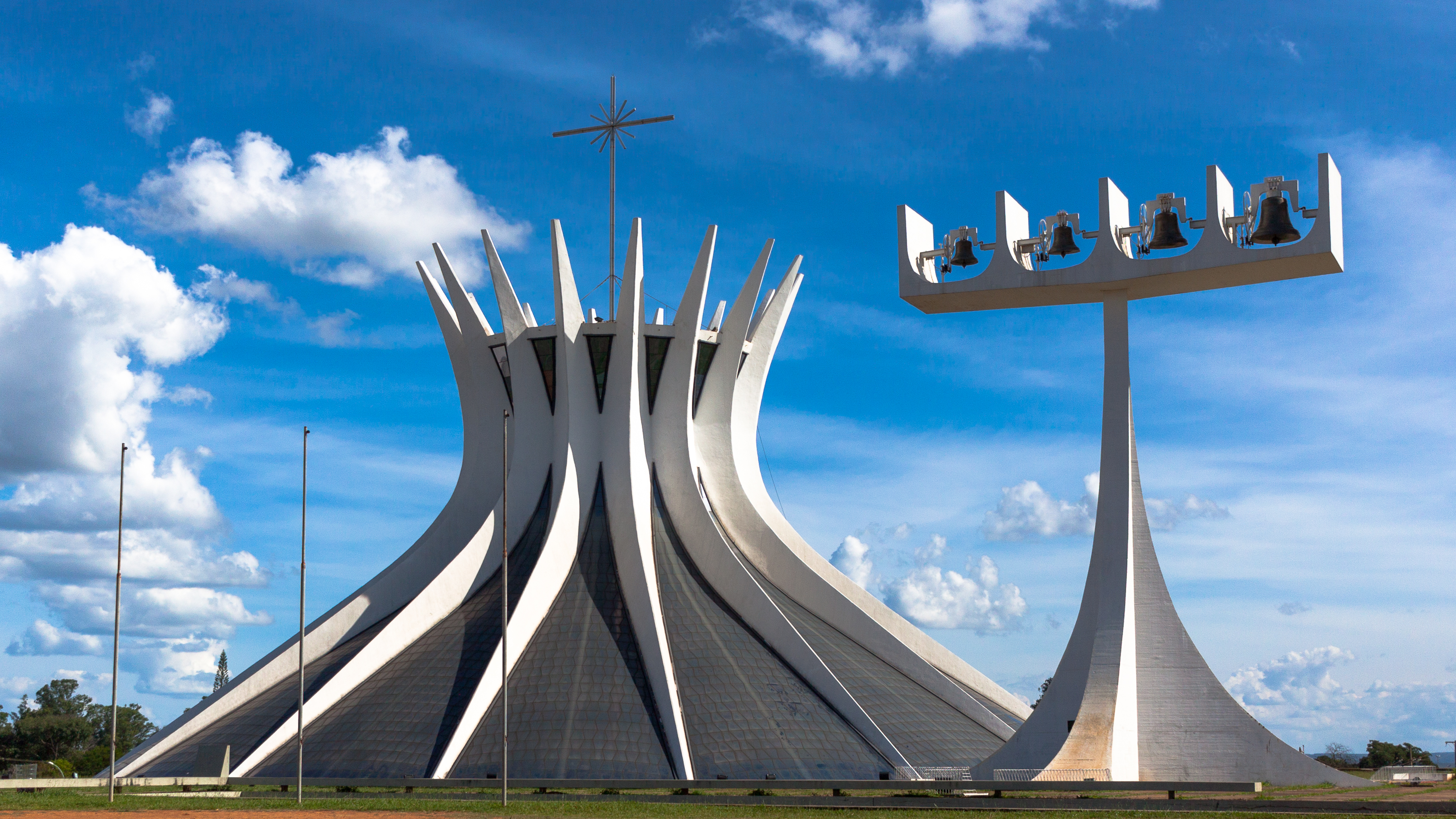 Catedral Metropolitana Nossa Senhora Aparecida